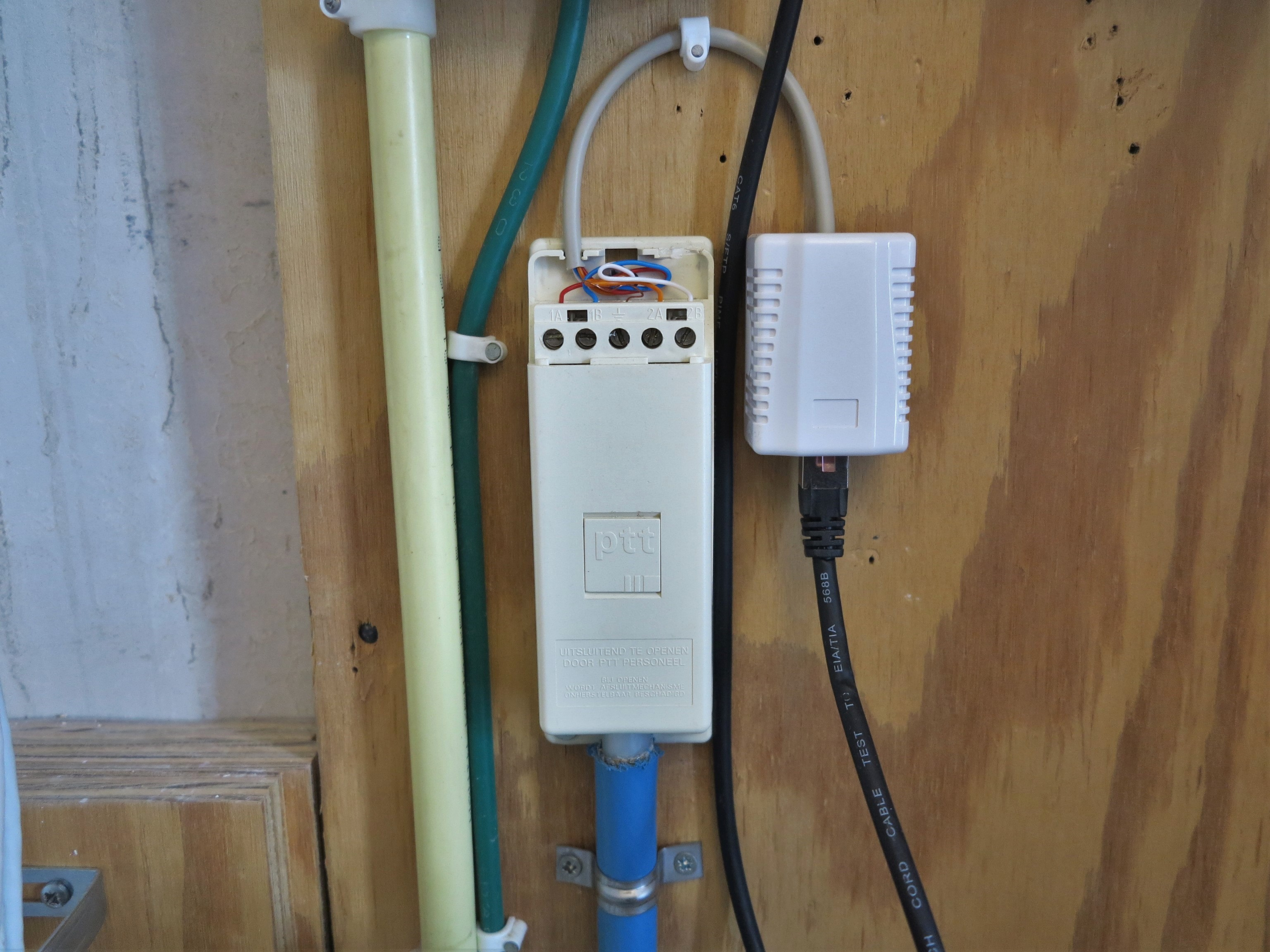 IS/RA type 1 van KPN.